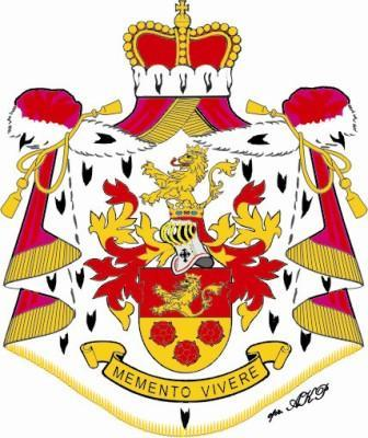 Henckel von Donnersmarck. Herb książęcy z 1901 r. (opr.: AK-P)